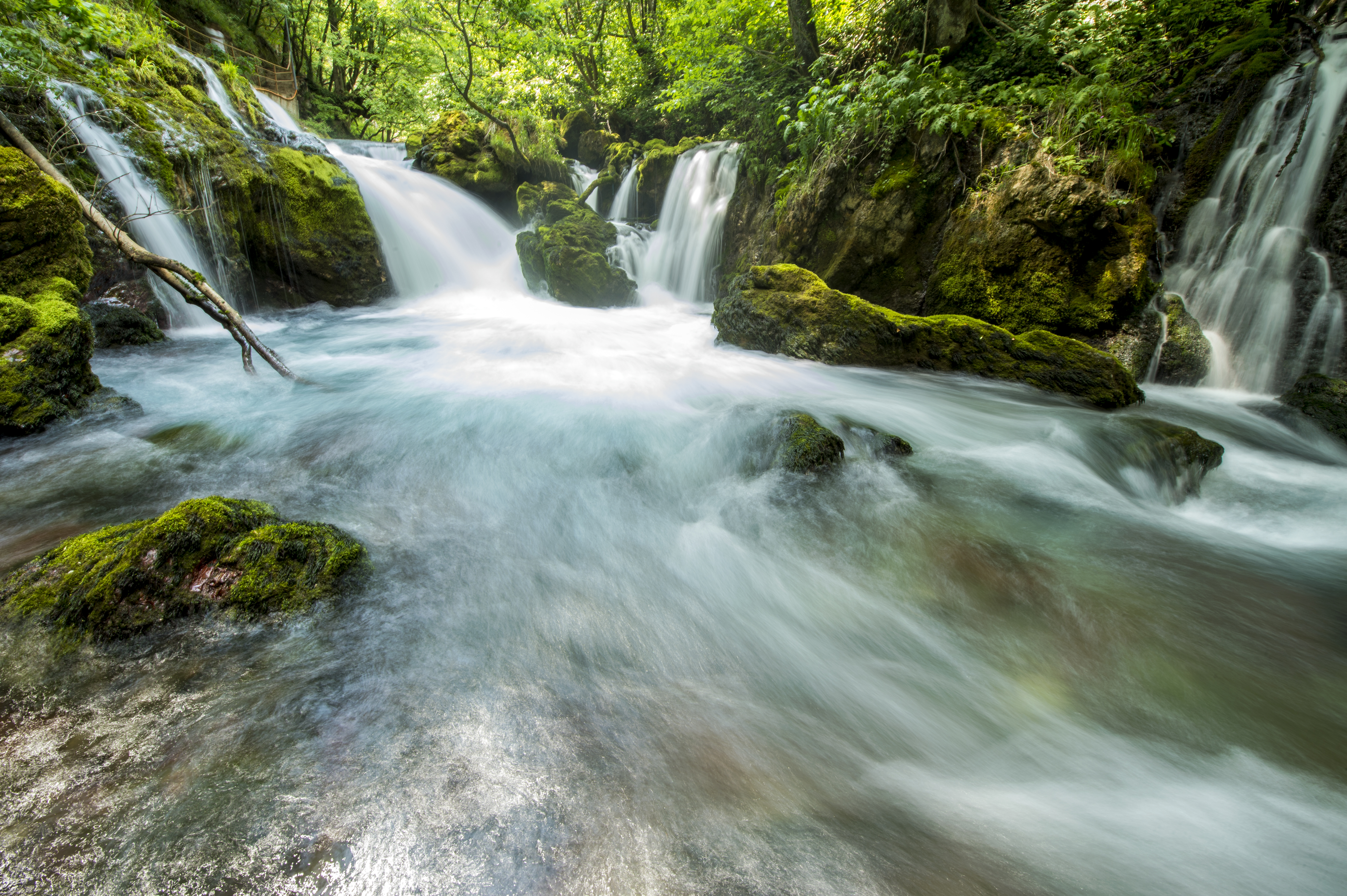 Burimi i Drinit të Bardhë dhe Shpella e Radavcit, Pejë